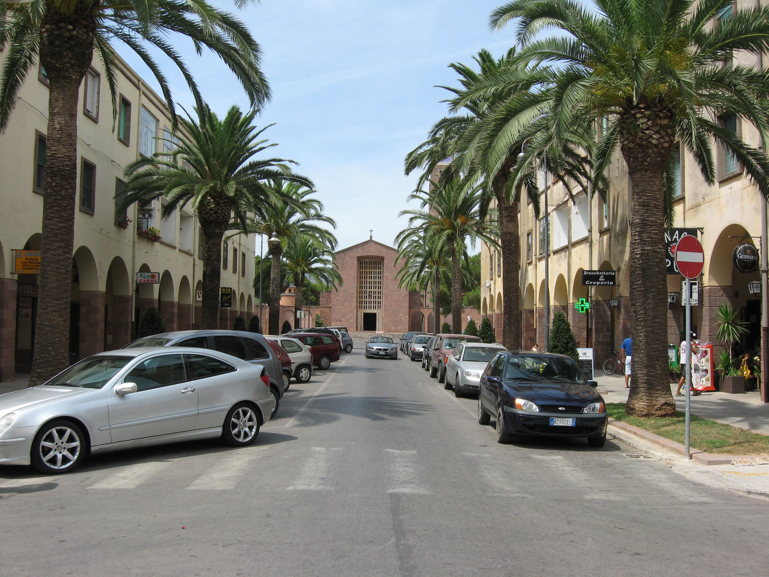 Fertilia (Alghero), Sardegna, Italia